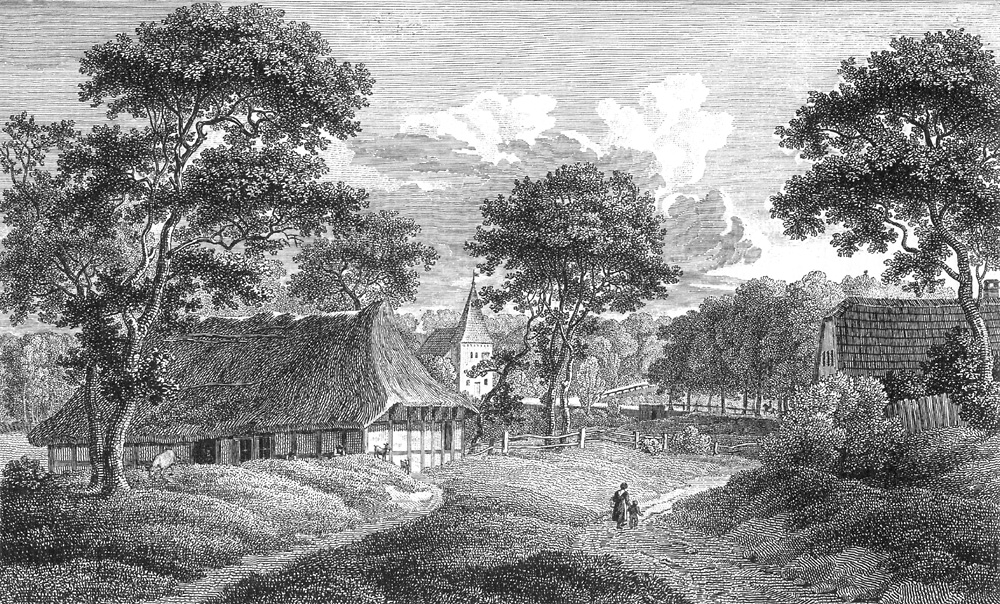 Bildvorlage von Anton Radl (1774–1852) aus dem Jahr 1818/1819: Bauernhaus in Blumenthal